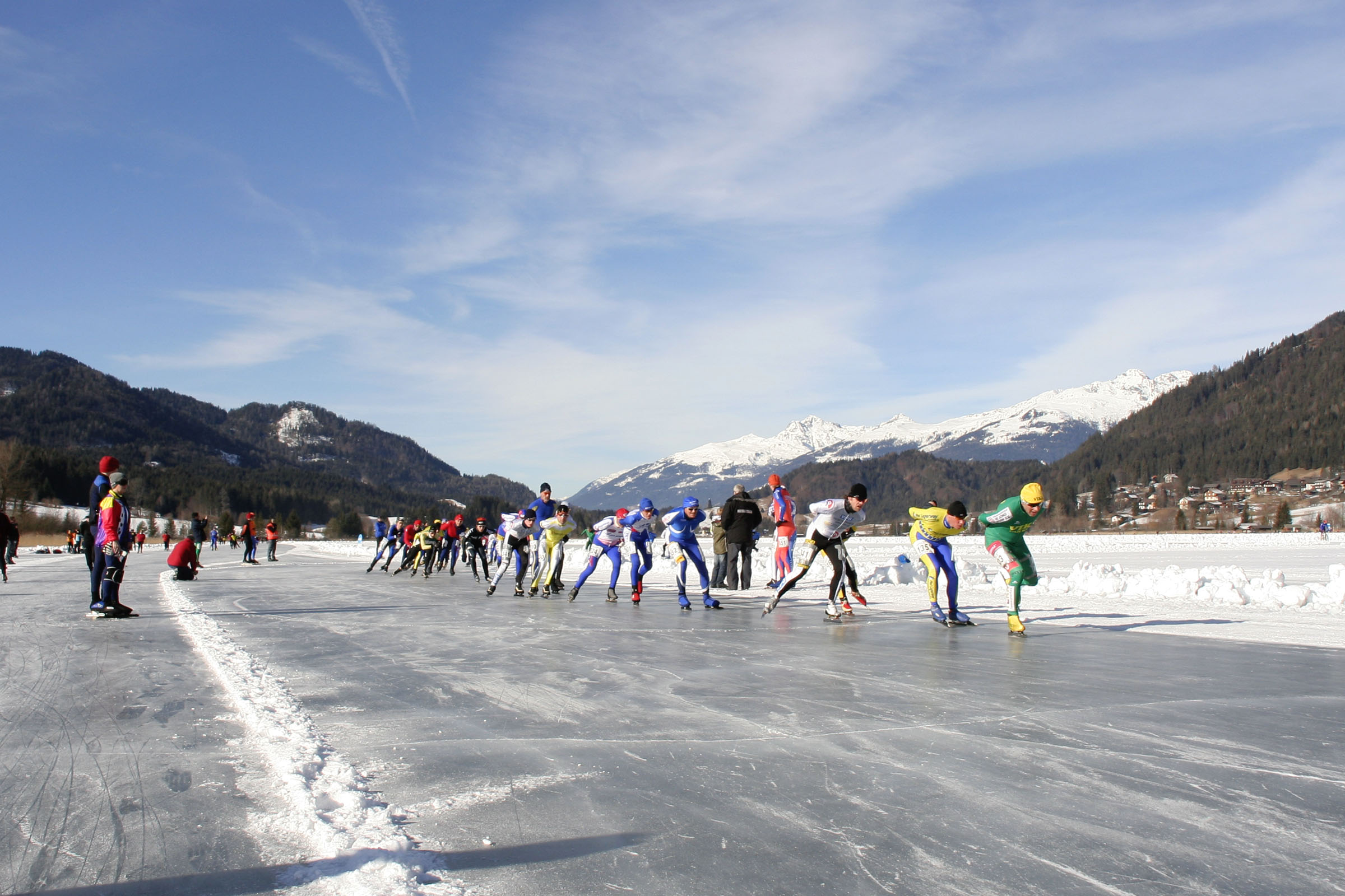 afbeelding schaatswedstrijd Weissensse